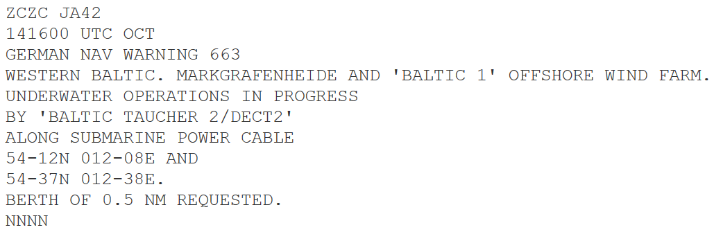 NAVTEX-Empfang auf 518 kHz, 2015-FEB-03, 0918 UTC